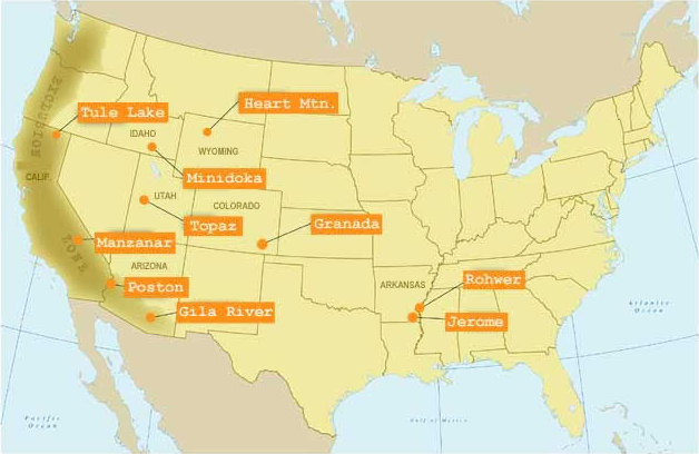 アメリカ合衆国日系人収容所所在地地図